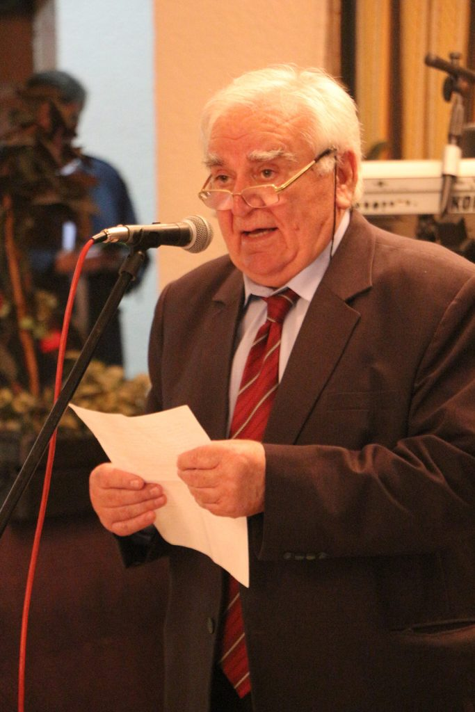 На Сусрету Козарчана у Београду 2019. године